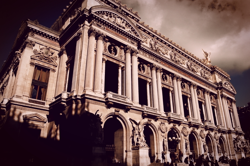 Palais Garnier, Paris